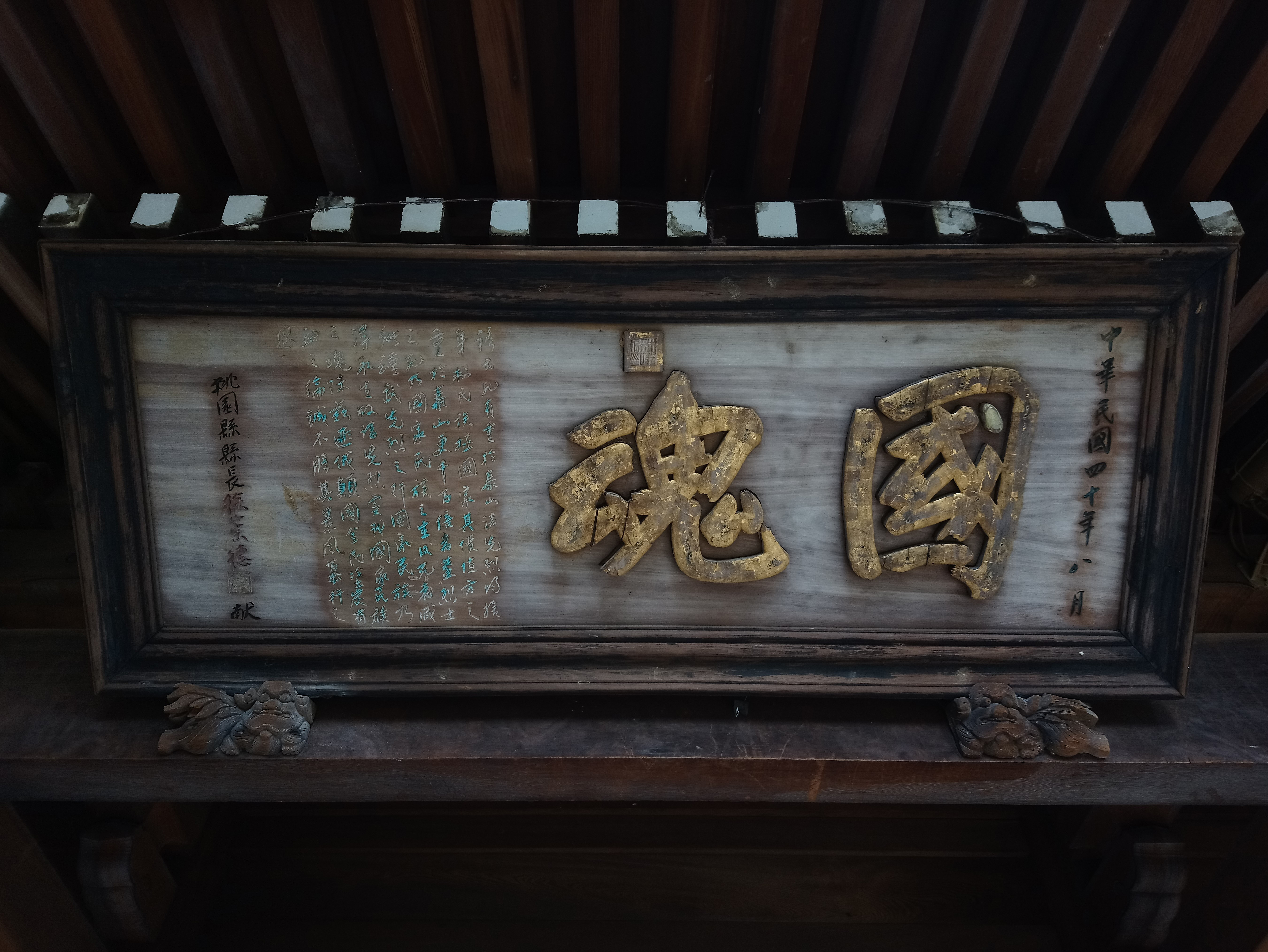 桃園忠烈祠桃園縣長徐崇德所題匾額,桃園市桃園區大會稽次分區三元里